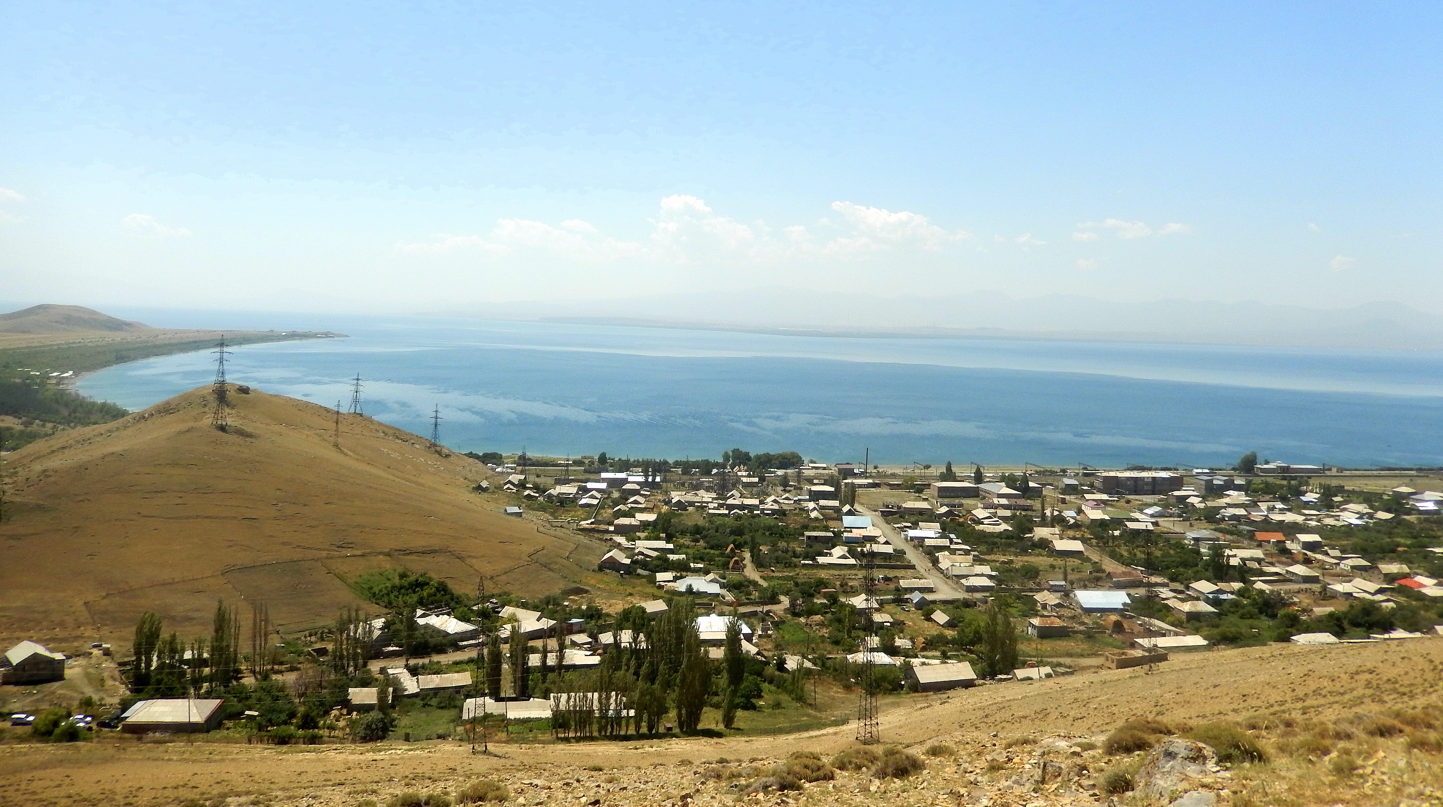 Շորժա, համայնապատկեր